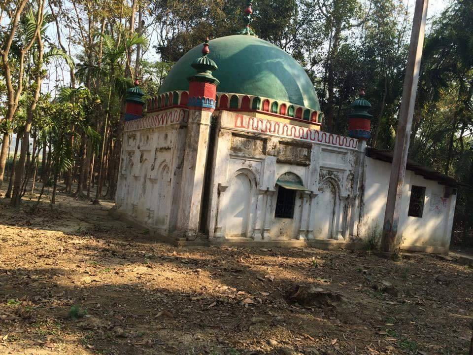 হাজার বছরের পুরনো মসজিদ